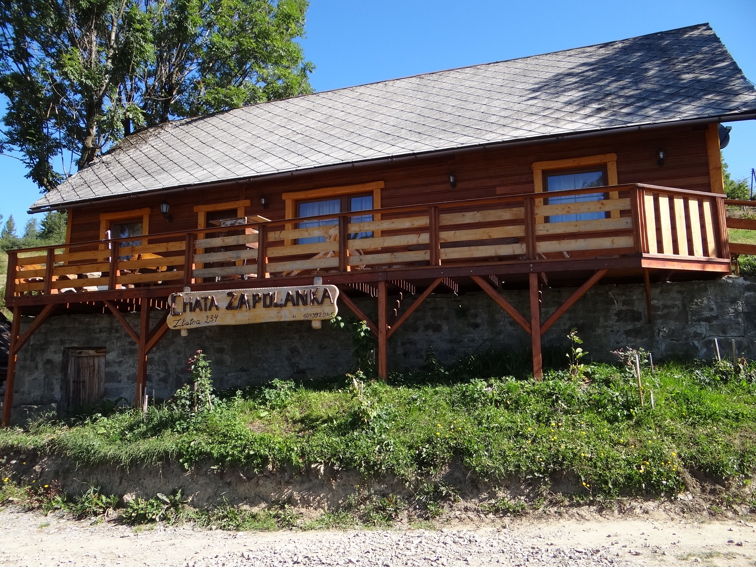 Chata "Zapolanka" w miejscowości Złatne w Beskidzie Żywieckim